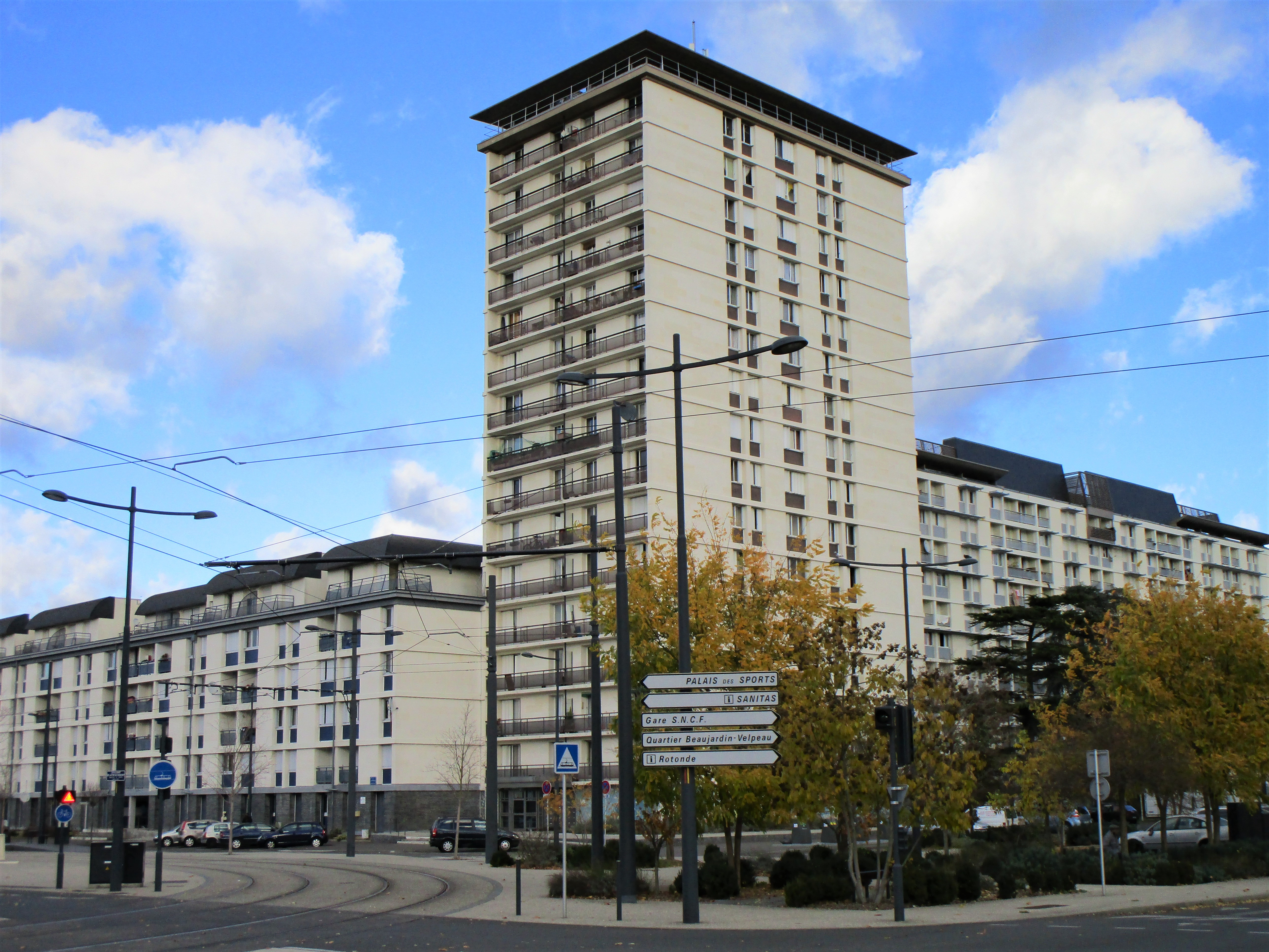 Allée de Montrésor dans le quartier du Sanitas, à Tours.